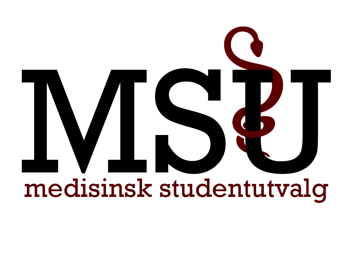 Logo tilhørende Medisinsk studentutvalg Oslo - studentutvalget ved Det medisinske fakultet, Universitetet i Oslo